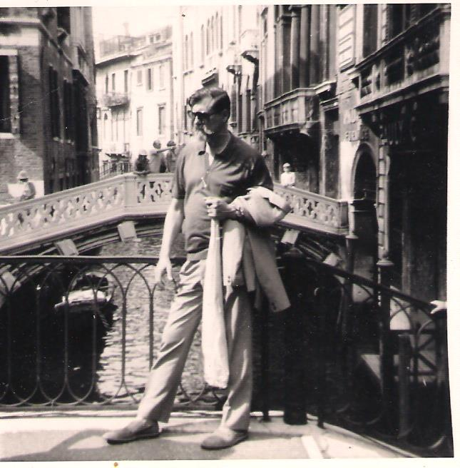 Jose Antonio Garcia-Blanco Peinador en Venecia, trabajando en 1974.